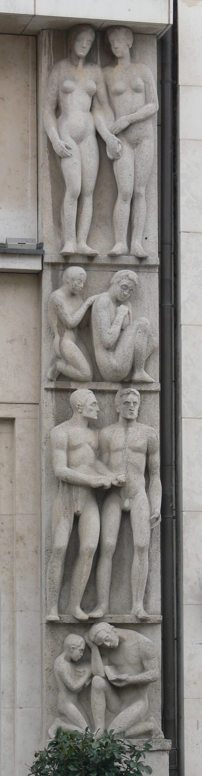 Sparkasse, Anger 25, Erfurt Relief von Hans Walther: vorsorgendes Sparen und seine Folgen